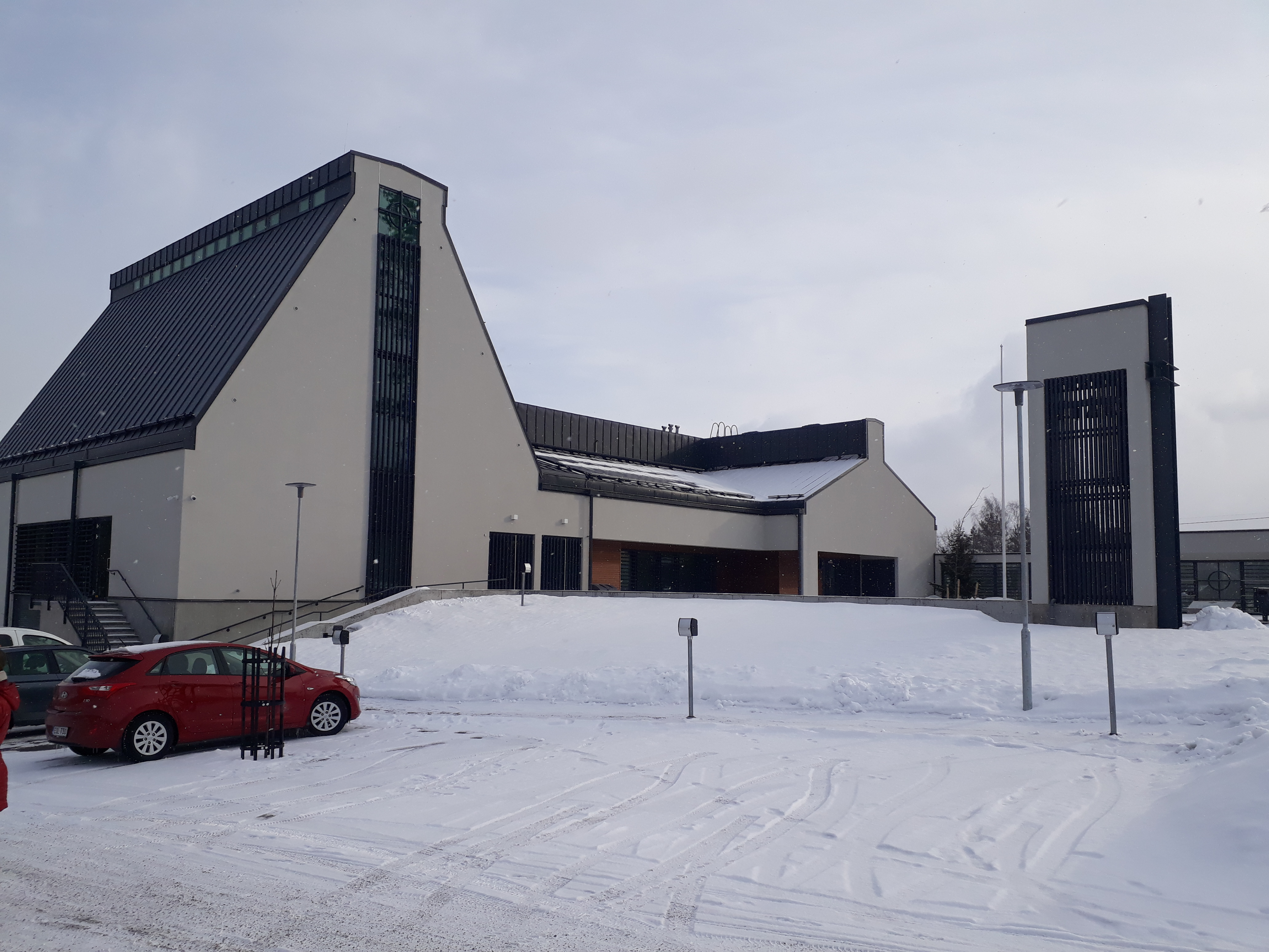 Söderkullan vuonna 2018 valmistunut kirkkorakennus. Kuvattu maaliskuussa 2019. Kirkkoa käyttävät Sipoon suomalainen ja ruotsalainen seurakunta.